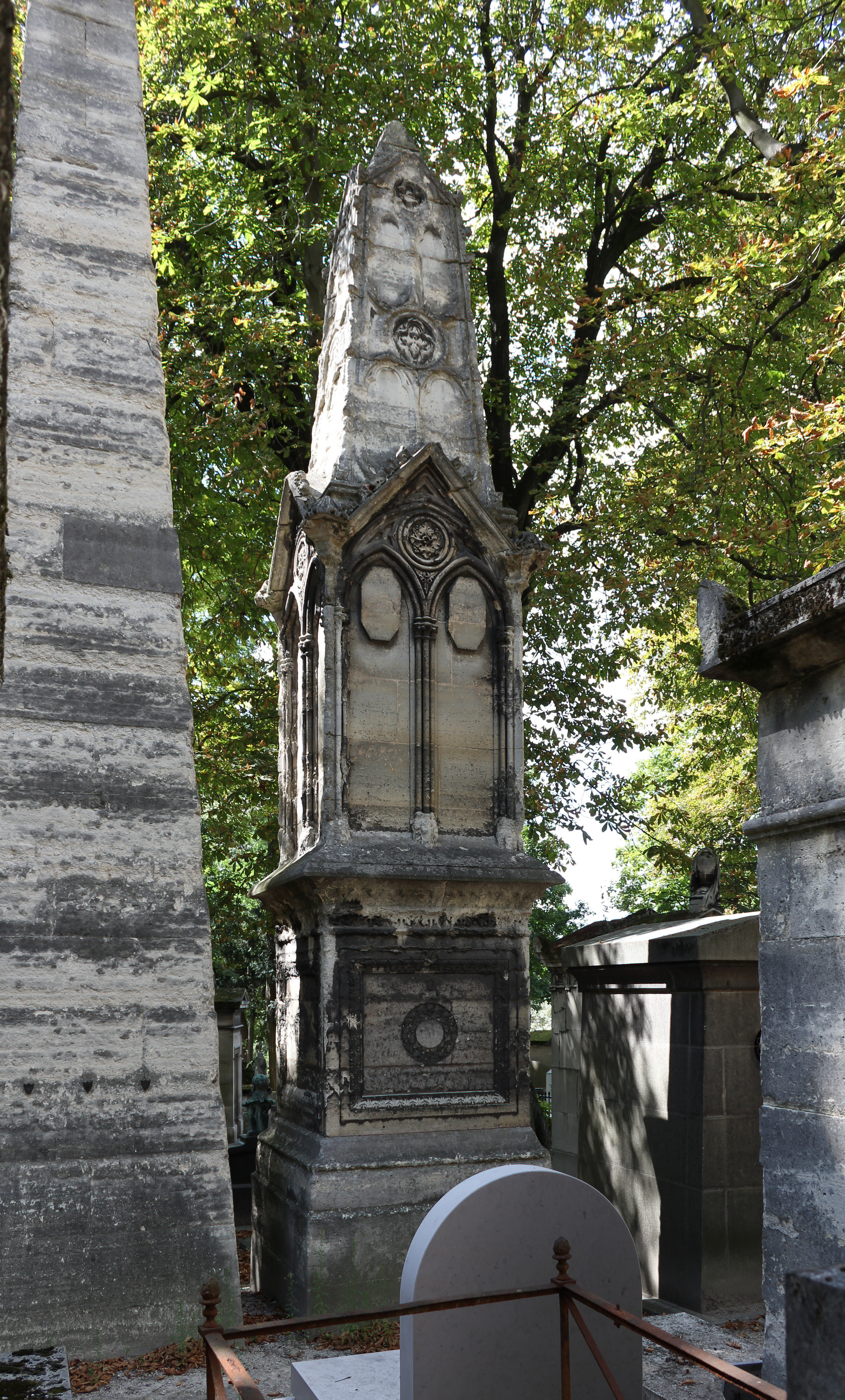 Sépulture de Michel Adanson (1727-1806), naturaliste.